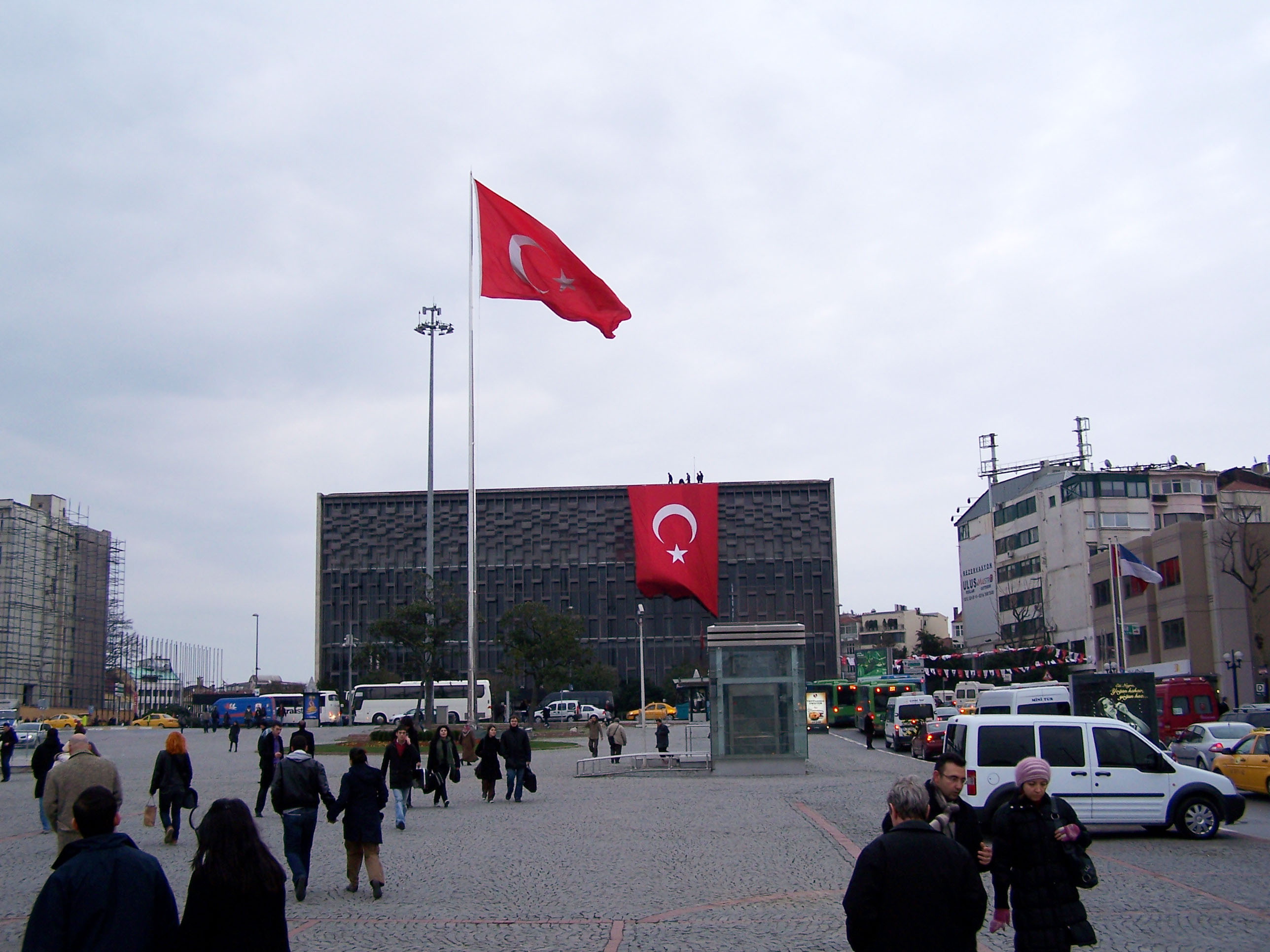 Big Turkish flag being mounted on Atatürk Kültür Merkezi at Taksim.